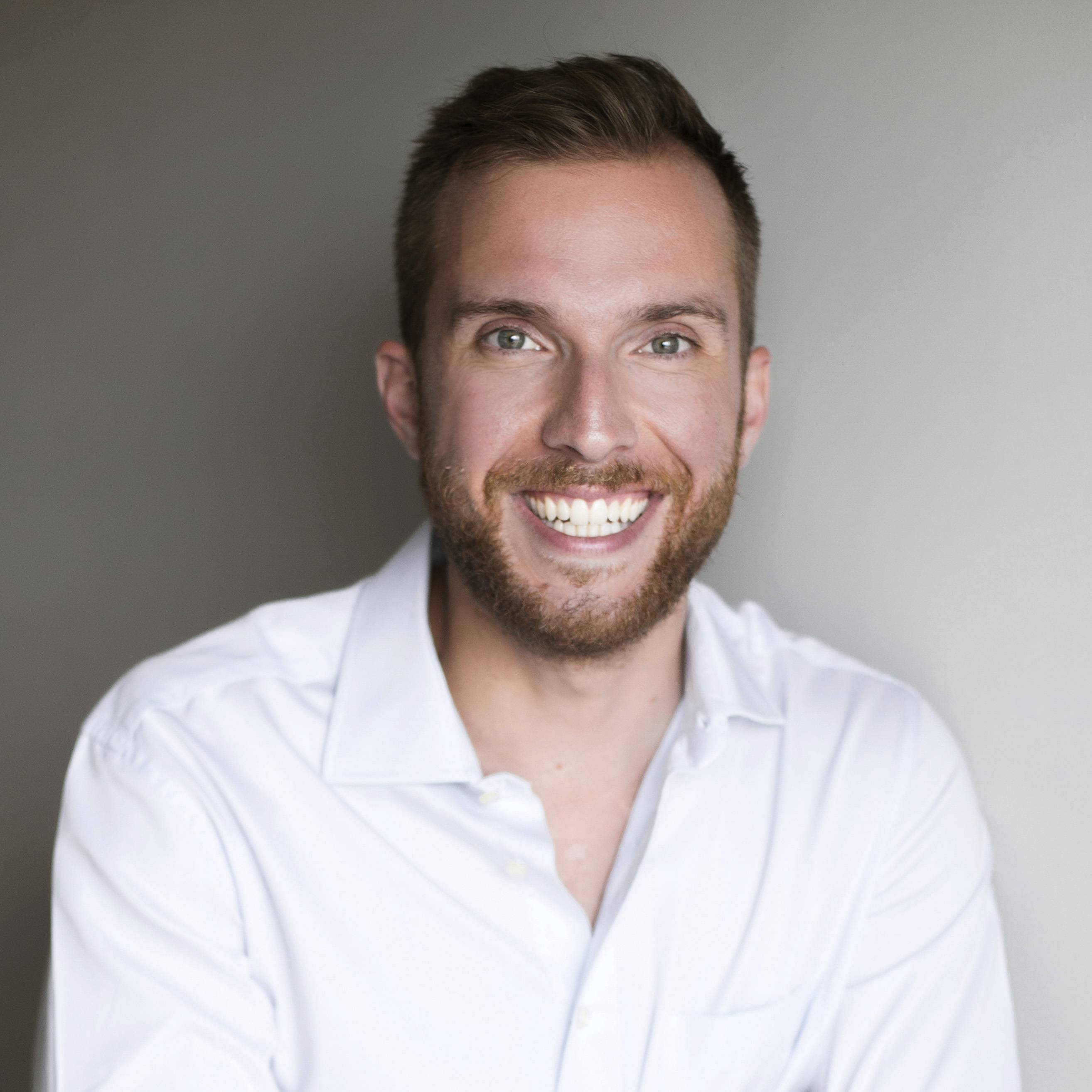 Vinicius Poit empreendedor